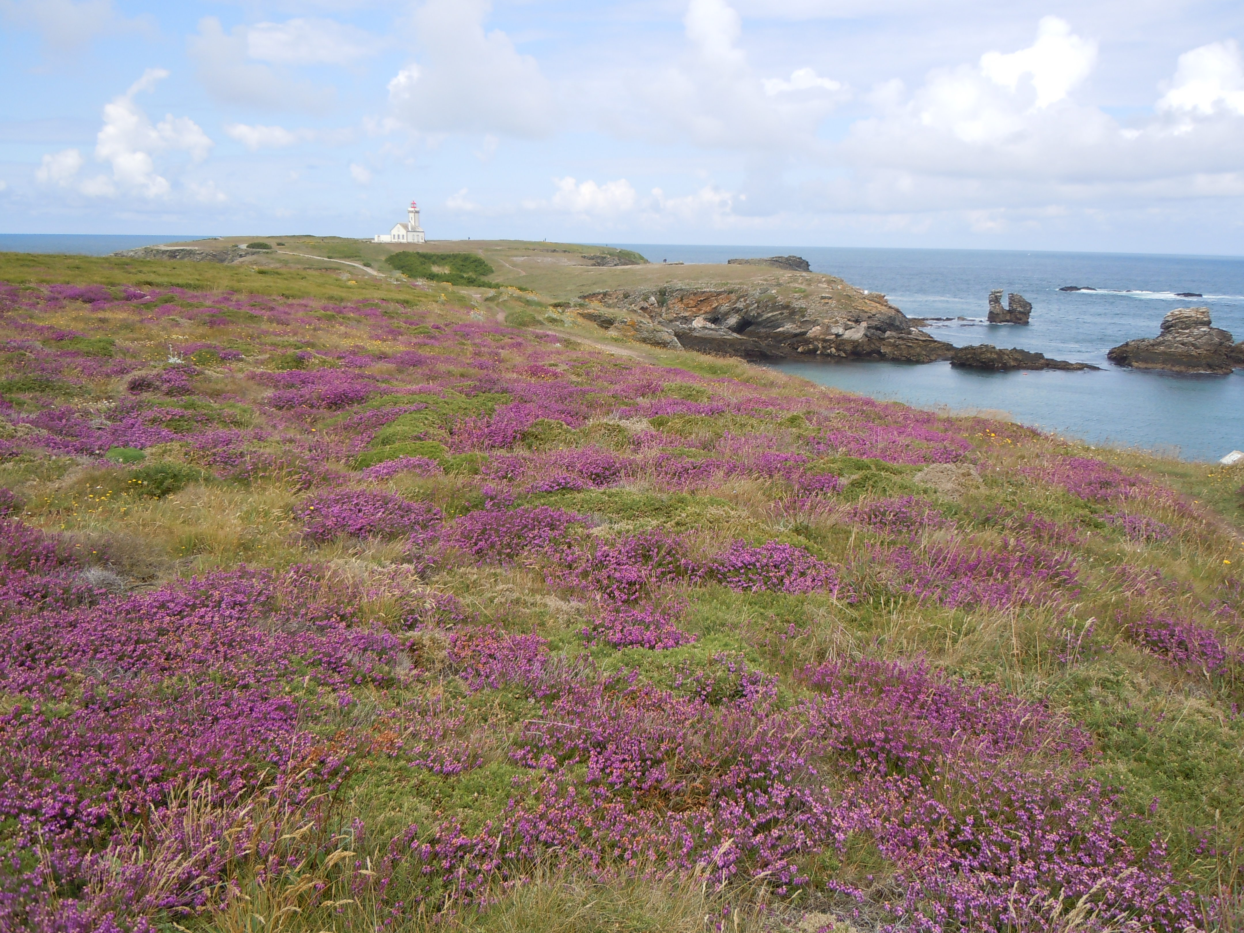 Bruyères à la Pointe des Poulains - Belle-Île-en-Mer (Morbihan, France).